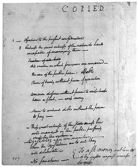 Alexander Hamilton Notizen für eine Rede zum amerikanischen Verfassungskonvent de:1787 Status: Public Domain nach US-Recht Words and Deeds in American History: Selected Documents Celebrating the Manuscript Division's First 100 Years Item 1 of 9 Alexander Hamilton's notes for a speech proposing a plan of government at the Federal Convention, [18 June 1787]. (Alexander Hamilton Papers) Title Alexander Hamilton (1757-1804), lawyer, Revolutionary patriot, and delegate to the Continental Congress, made these notes in preparation for a major speech delivered on 18 June 1787 at the Constitutional Convention assembled in Philadelphia, Pennsylvania. An early and vocal critic of the Articles of Confederation, Hamilton was firmly aligned with the nationalist faction at the convention. Some historians believe that Hamilton's 18 June speech was his most important public document because it outlined his philosophy of government. Hamilton favored a centralized national government which placed strict limitations on the powers of states and individuals. He later addressed many of these same concerns in The Federalist Papers, the much-cited collection of essays he wrote with James Madison (1751-1836) and John Jay (1745-1829) to explain and encourage ratification of the Constitution, and in the public reports of the first federal administration, during which Hamilton served as secretary of the treasury. Gerard W. Gawalt, Manuscript Division For Additional Information For additional information on the Alexander Hamilton Papers, you can leave this site and read a summary catalog record for the collection. Reproduction Number: A46 (color slide; first scanned image; no page number); LC-MSS-24612-14 (B&W negative; pages [95] and [98]) and LC-MSS-24612-15 (B&W negative; page [71])